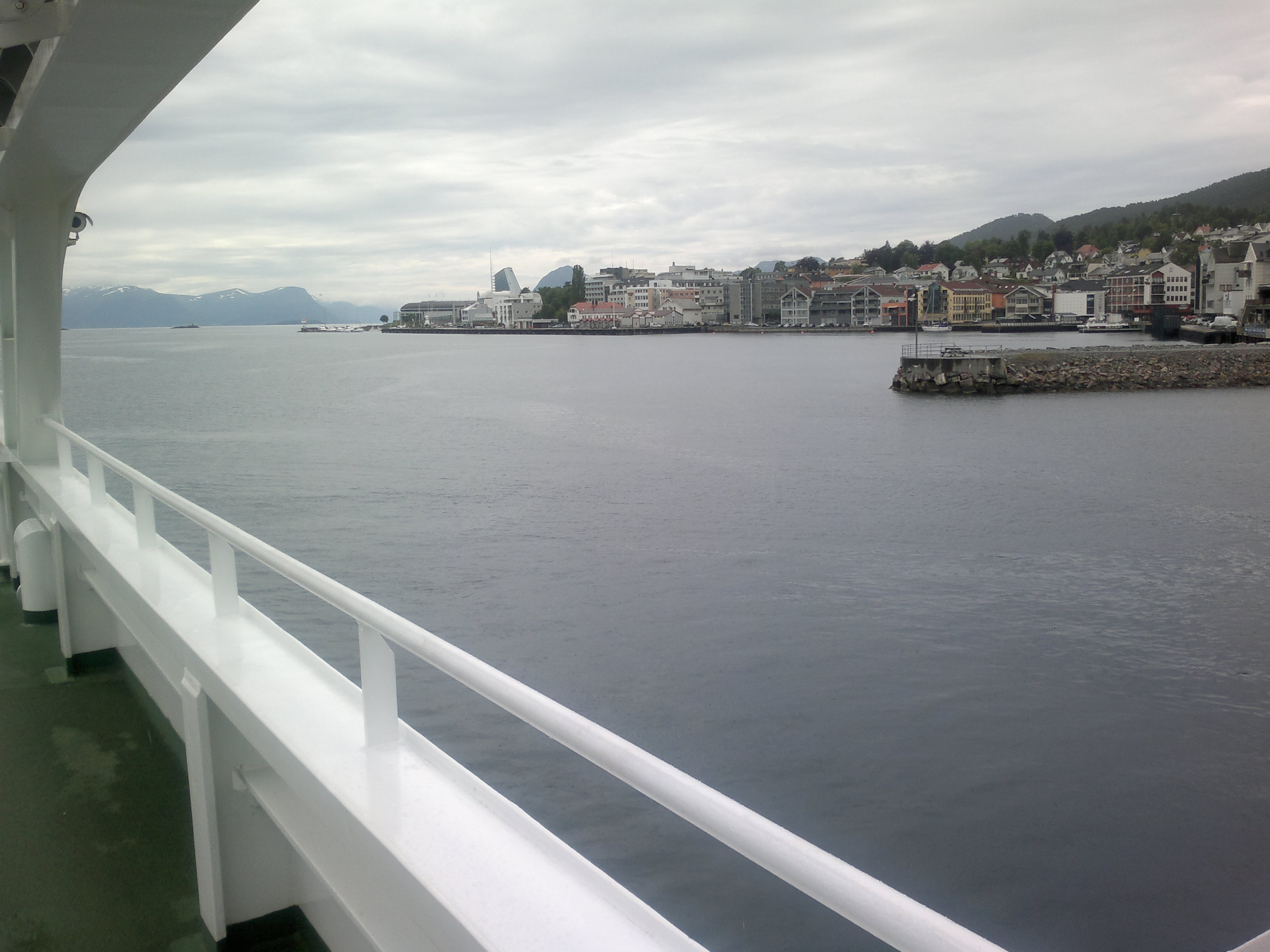 Näkymä Moldesta ja Moldefjordenista lautalta kuvattuna.